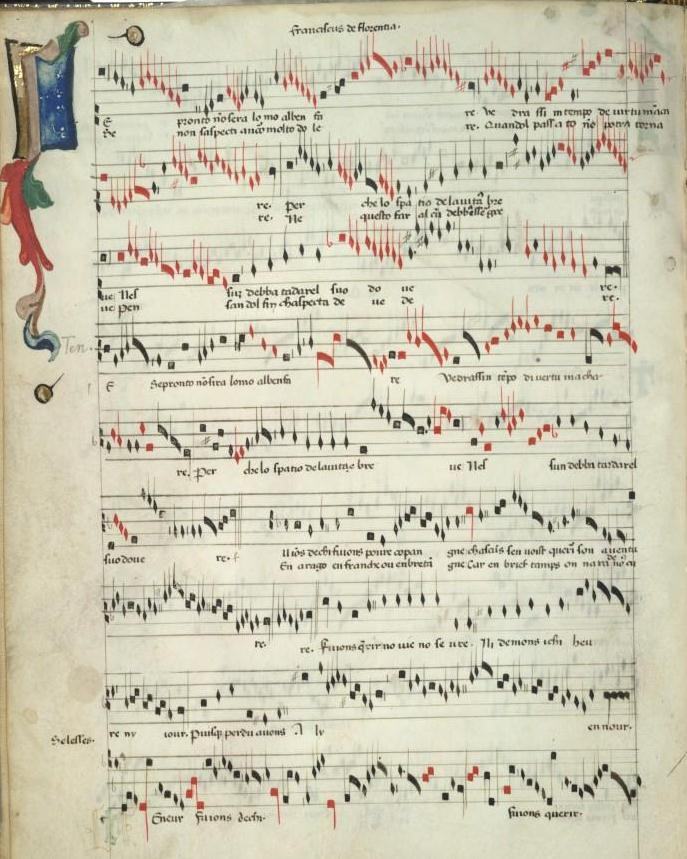 Modena BE α. 5,25